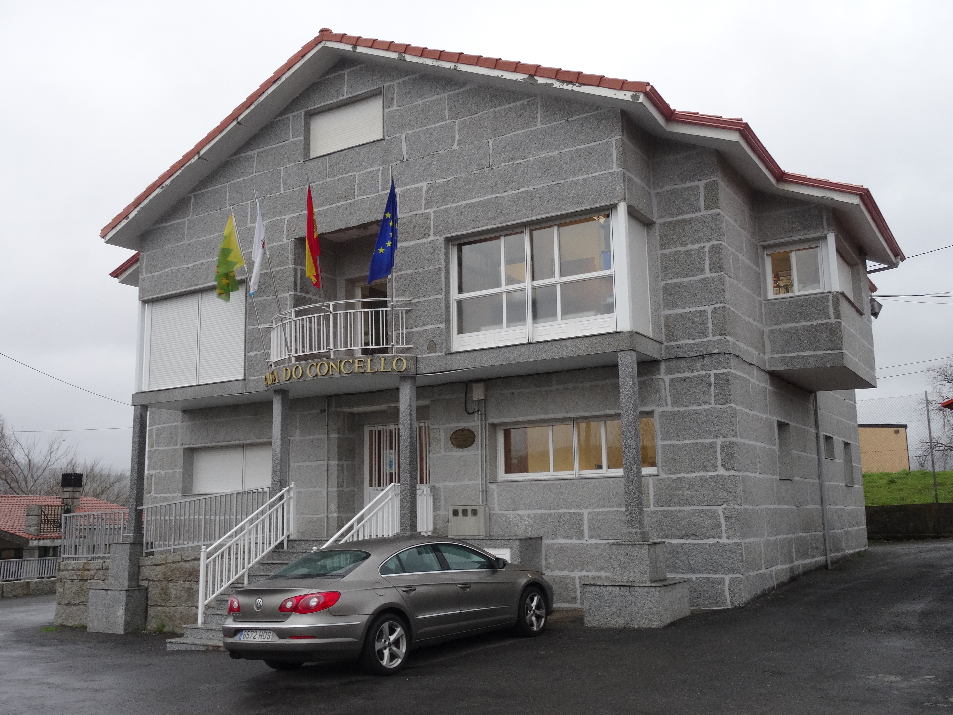 Casa do concello de Lobeira, Ourense.